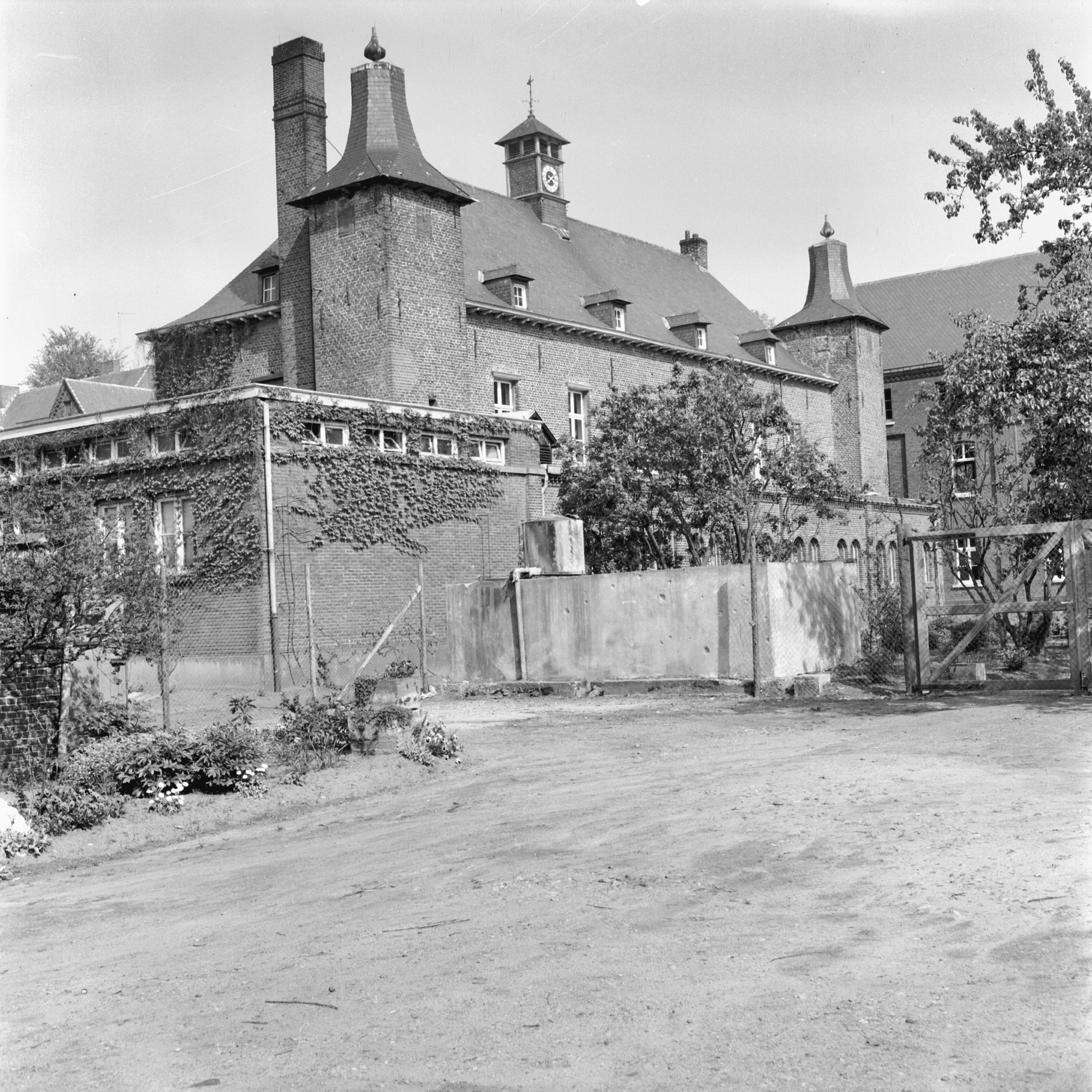 Kasteel Exaten: overzicht